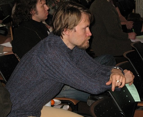 Sven-Erik Soosaar Erakonna Eestimaa Rohelised Tallinna piirkonna asutamiskoosolekul Tallinna Ülikooli peahoones